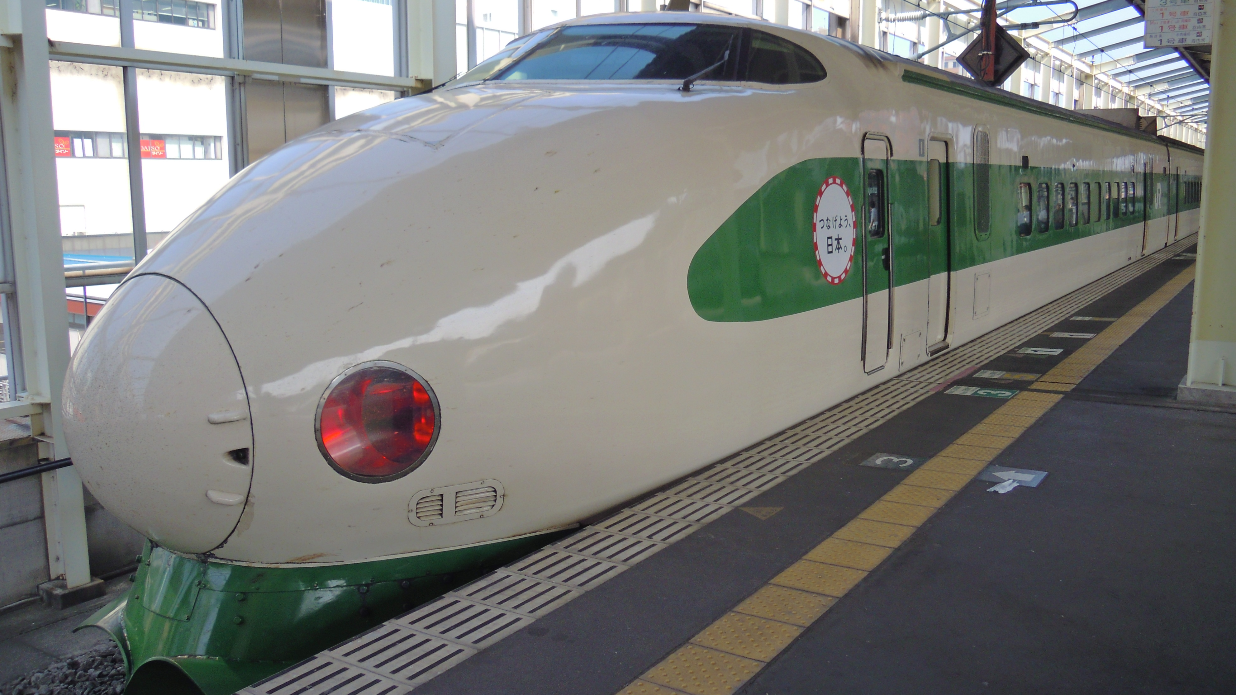 高崎駅にて撮影。「つなげよう、日本。」の文字が書かれている。